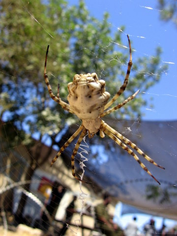 Argiope lobata (female); נקבת כסופי מפורץ